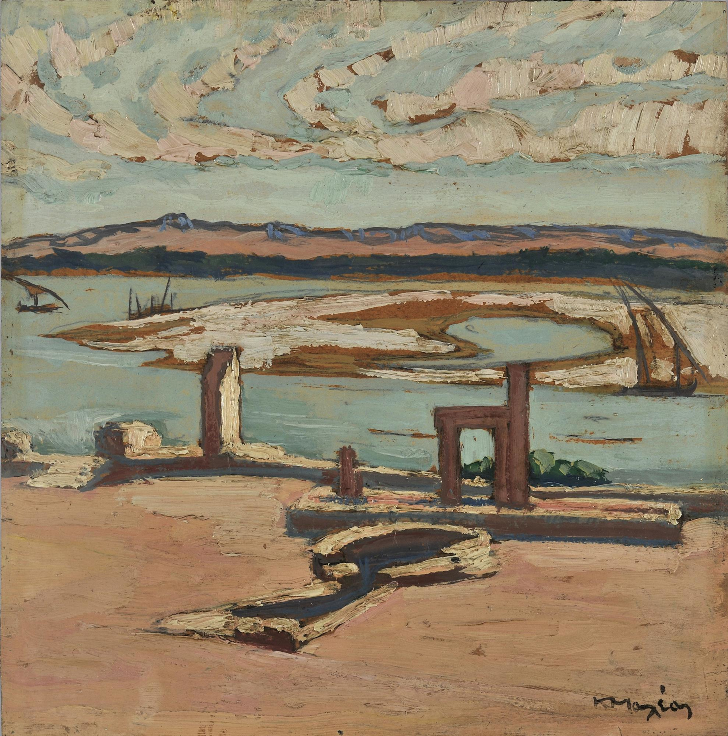 Κωνσταντίνος Μαλέας, Ασσουάν του Νείλου